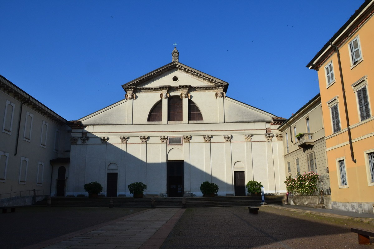 San Vittore facciata primavera